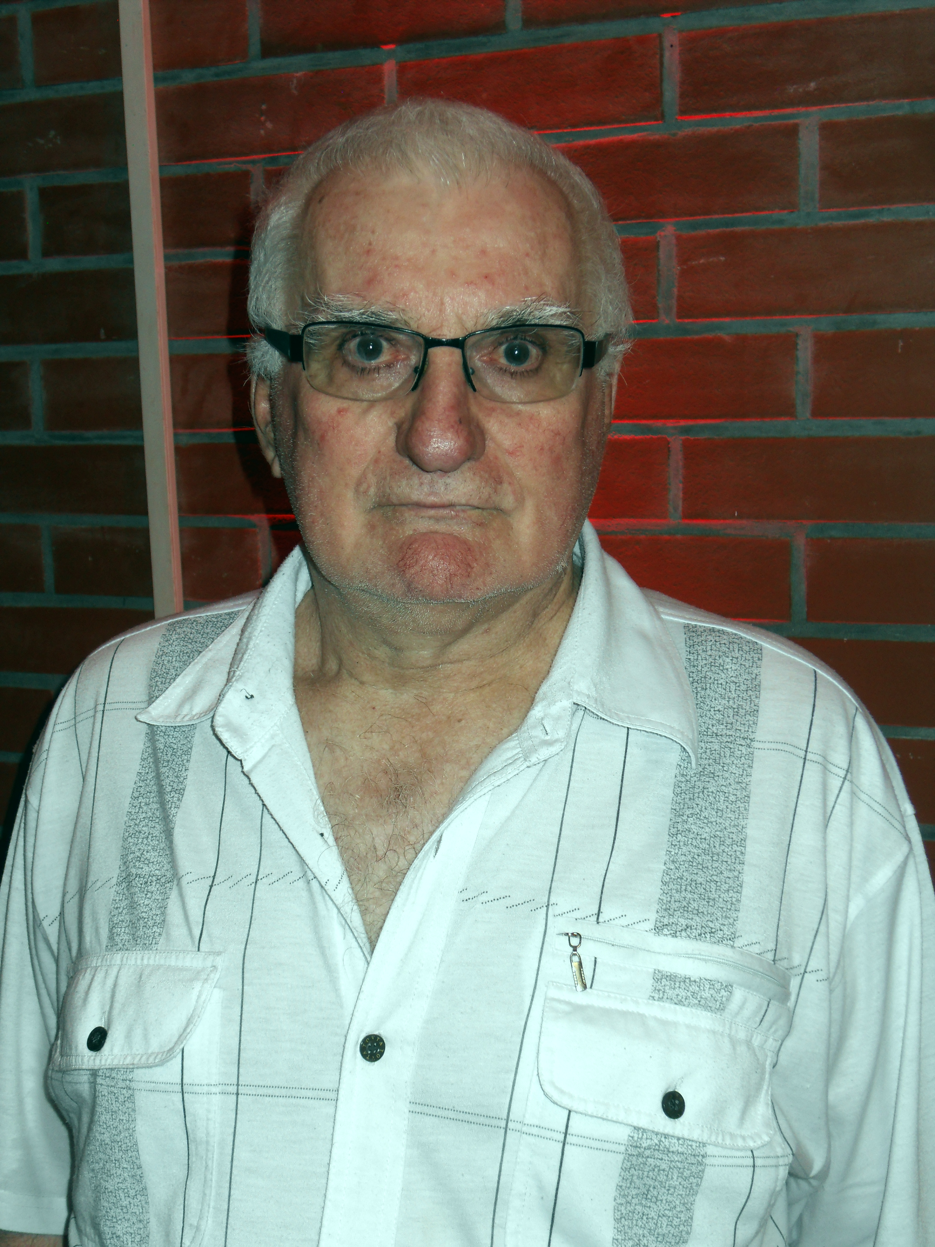 Robert Zawada, mielecko-gdański szczypiornista i trener.